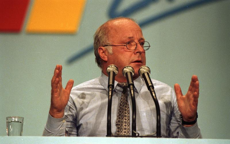 13.06. - 15.06.1988 36. CDU-Bundesparteitag in der Rhein-Main-Halle in Wiesbaden